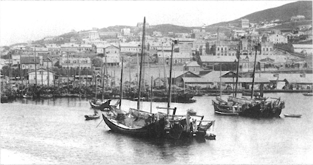 jписание в источнике: «Таким предстал Владивосток перед В.К. Арсеньевым в начале XX века».